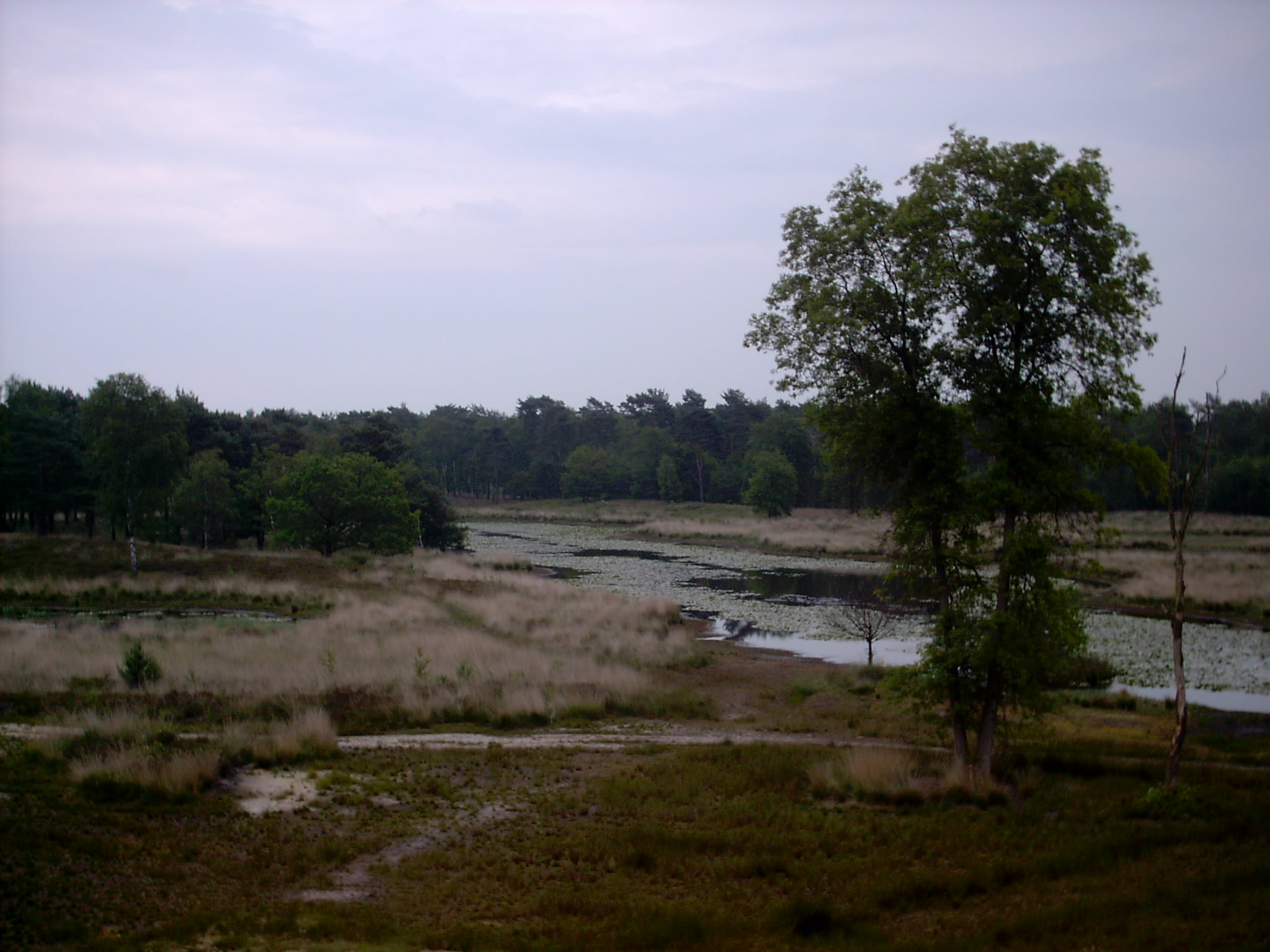 Het Ravenvennengebied oostenlijk van Lomm kent een grote variatie aan vennen, open graslanden en kleinschalige heideveldjes, omgeven door stuifduinen waarop grove den is aangeplant. Deze boomsoort wordt steeds meer vervangen door eiken en berken, om zo een grotere biodiversiteit te scheppen.